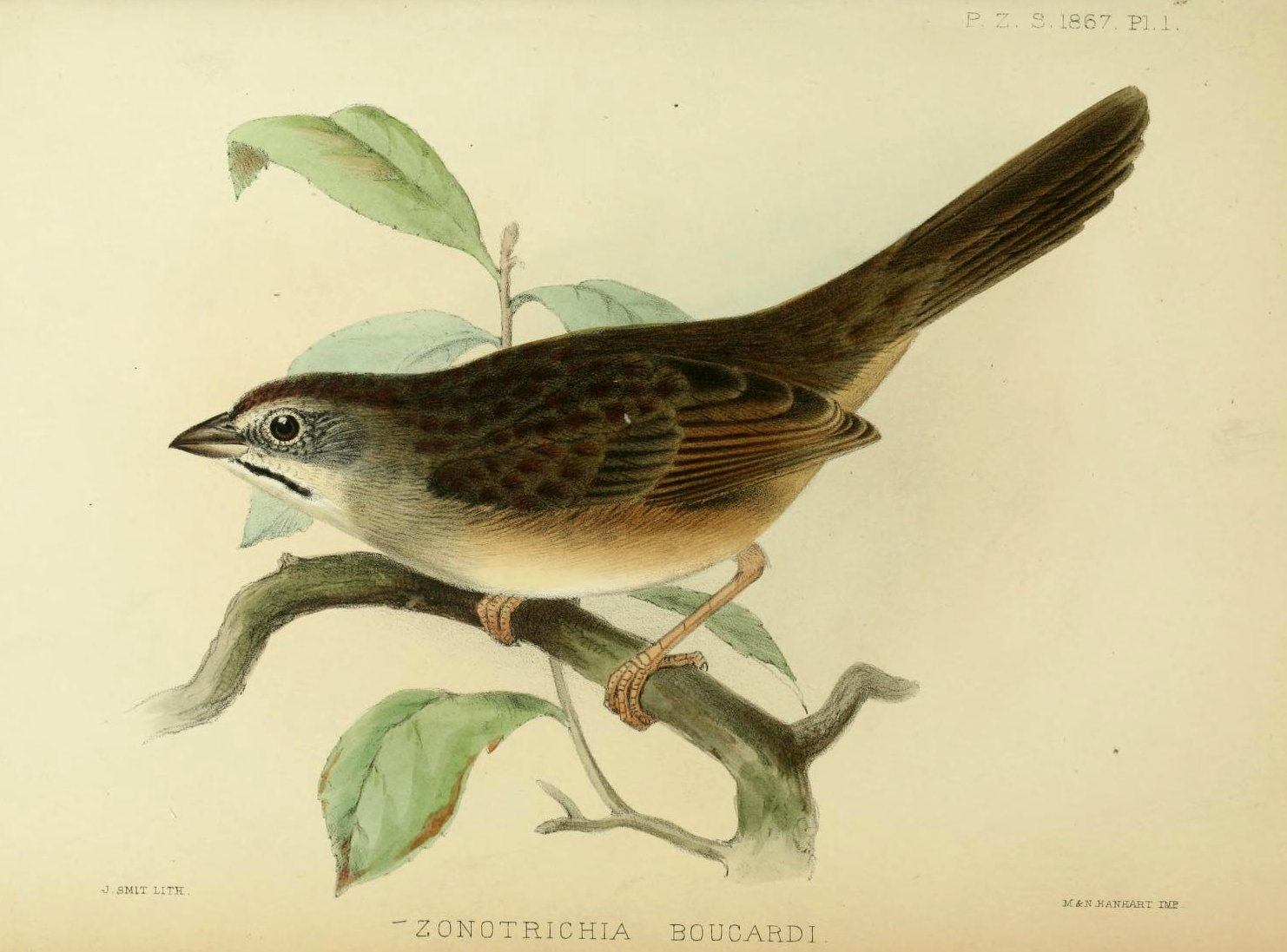 Zonotrichia boucardi (Aimophila ruficeps boucardi)